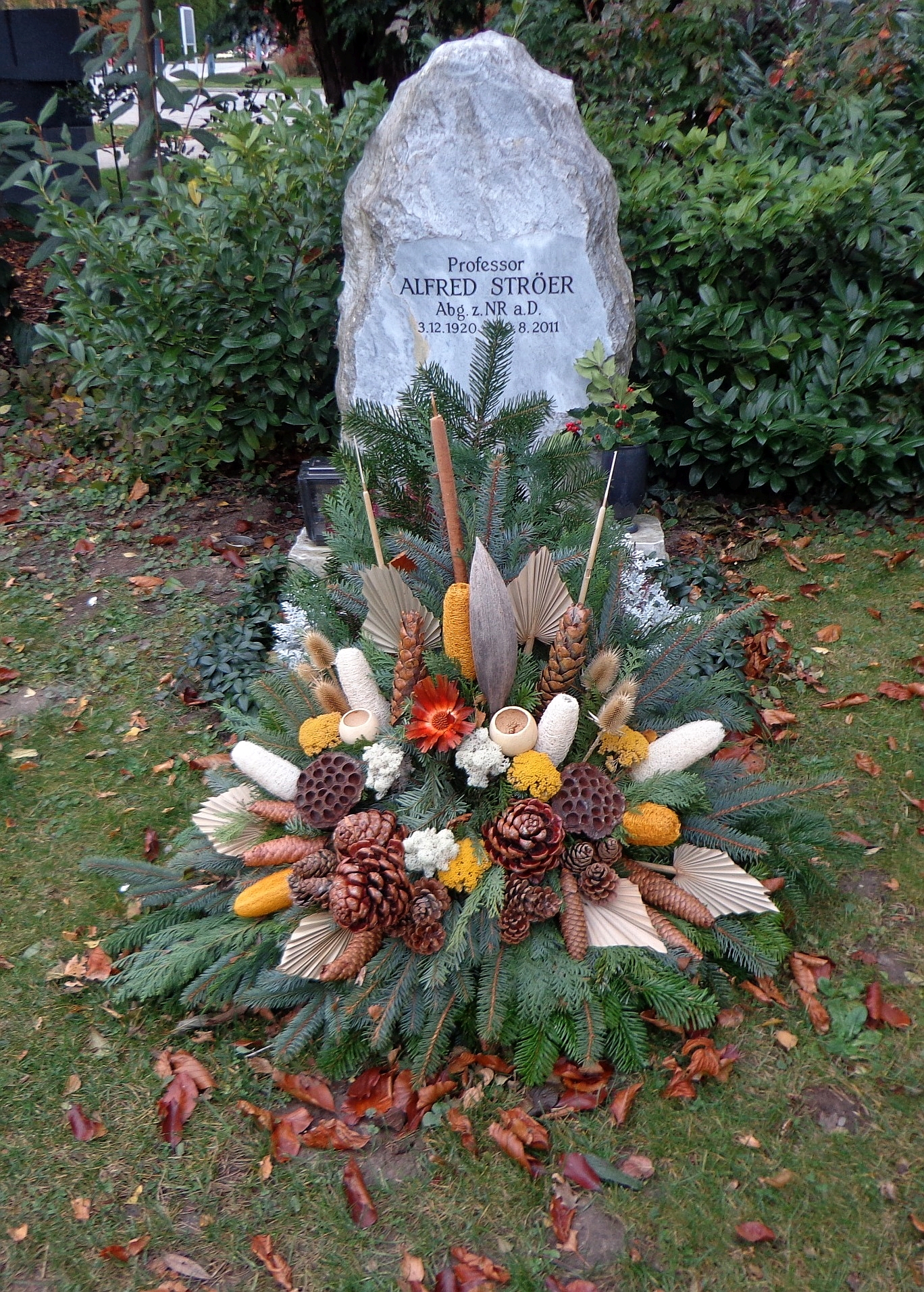 Wiener Zentralfriedhof - Gruppe 14 C, Ehrengrab von Alfred Ströer